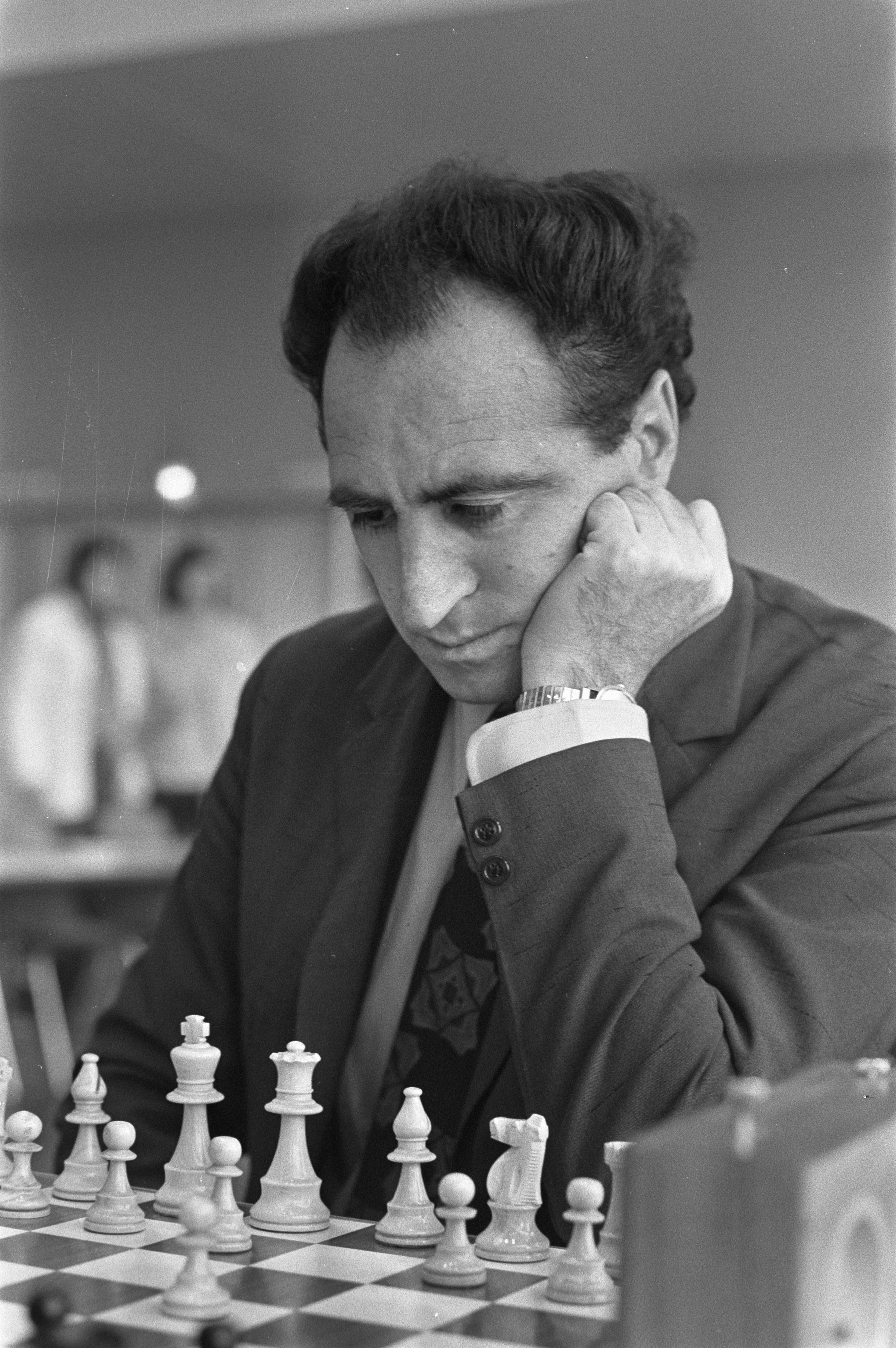 Lev Polugaevsky